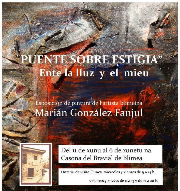 Esposición de pintura "Puente sobre Estigia. Ente la lluz y el mieu"